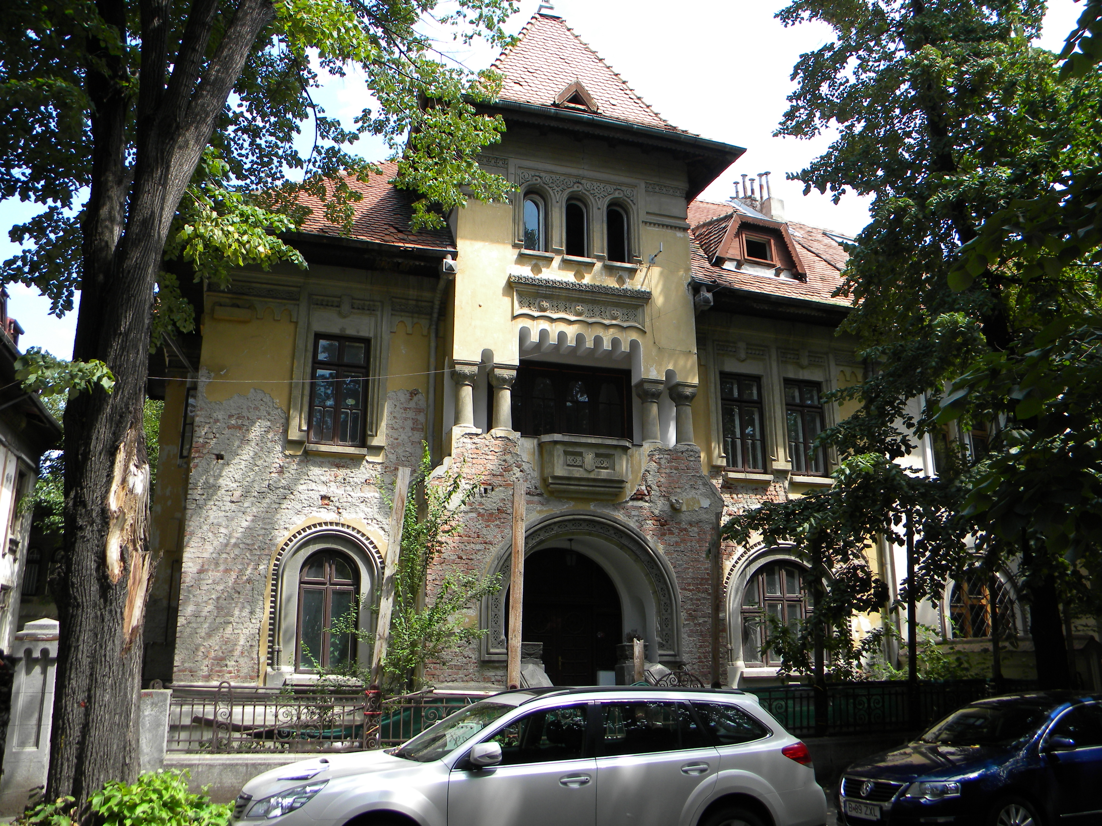 Bucuresti, Romania, Str. Haga, Vila nr. 9; B-II-m-B-18895